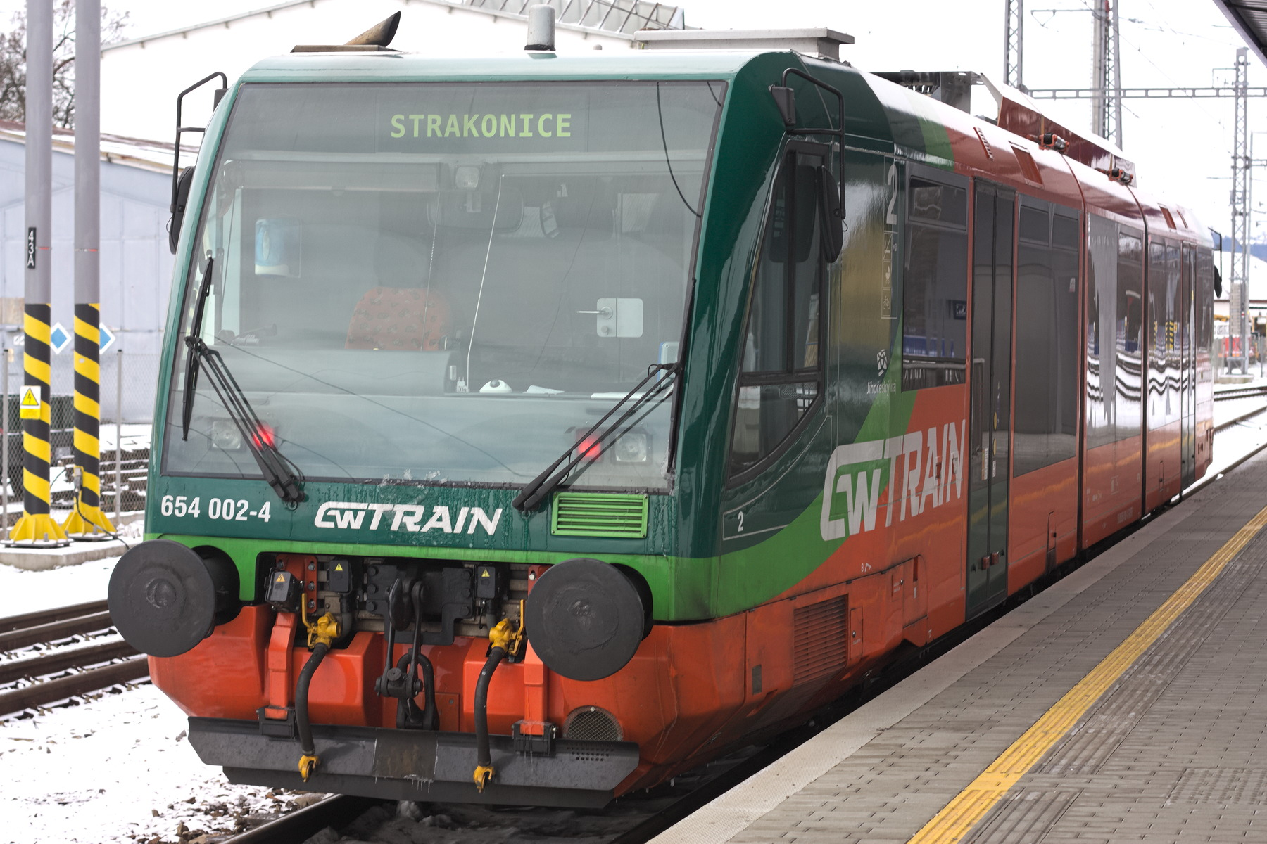 GW Train 654 002-4 am Bahnhof Strakonice.